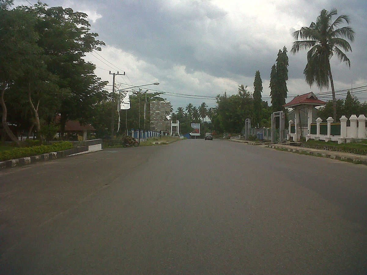 La rue principale de Raha, Sulawesi du Sud-Est, Indonésie